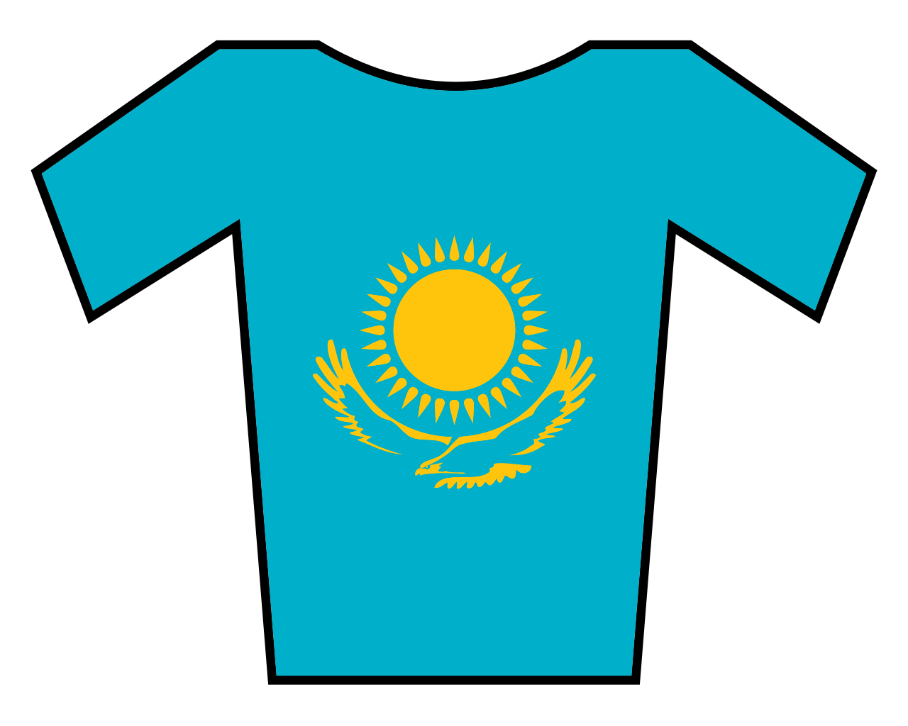 Maillot de Kazajistán